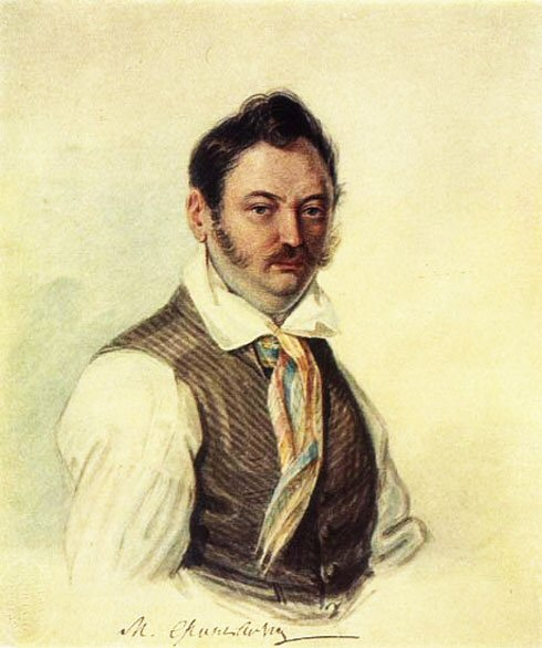 Портрет декабриста Михаила Александровича Фонвизина работы Н.А. Бестужева